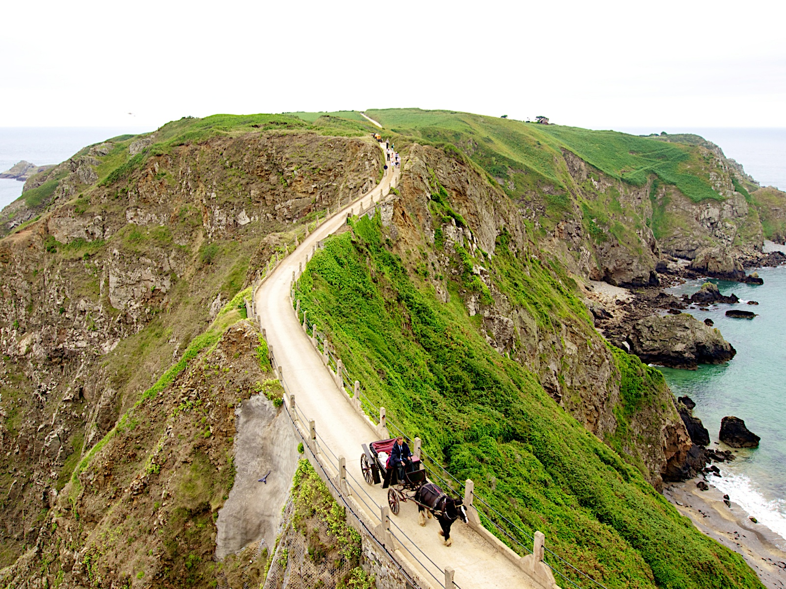 La Coupee